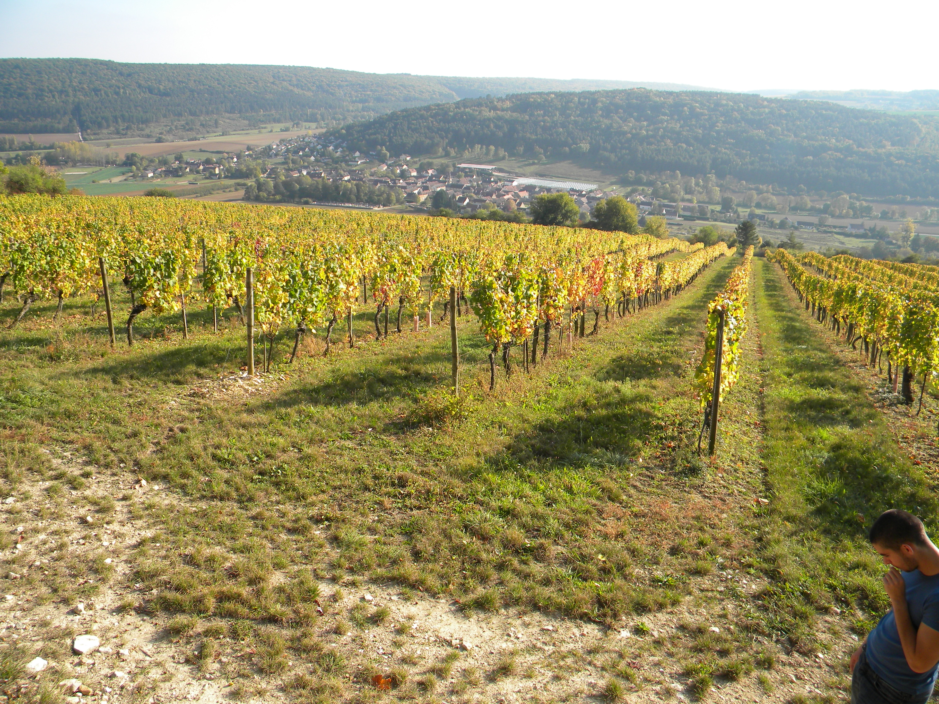 Meuilley du coteau de Myon